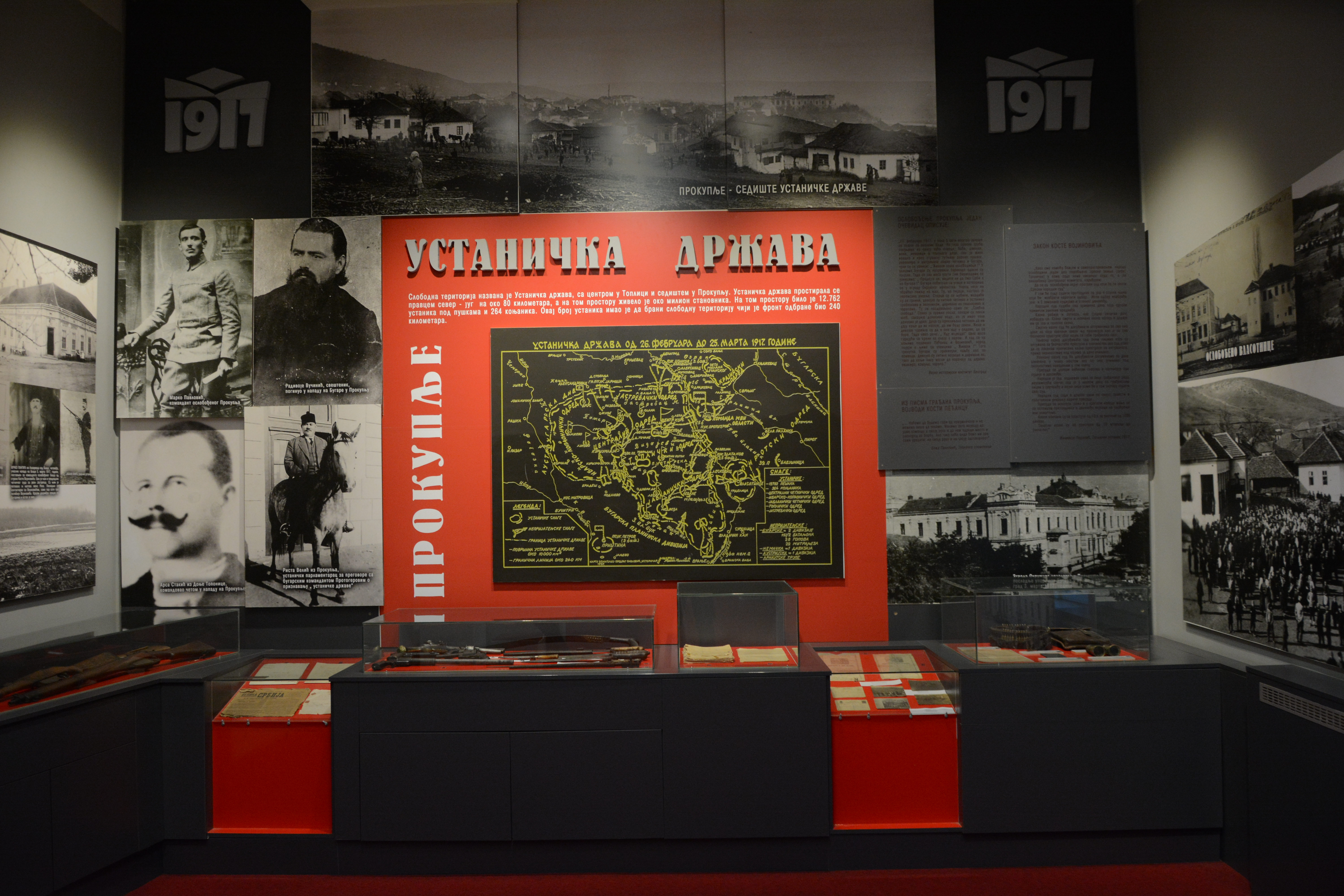 Ова датотека је донација Народног музеја Топлице, у оквиру програма стажирања реализованог од стране Викимедије Србије. This file is donated by the National museum of Toplice, as part of the Wikipedian in Residence program implemented by Wikimedia Serbia.